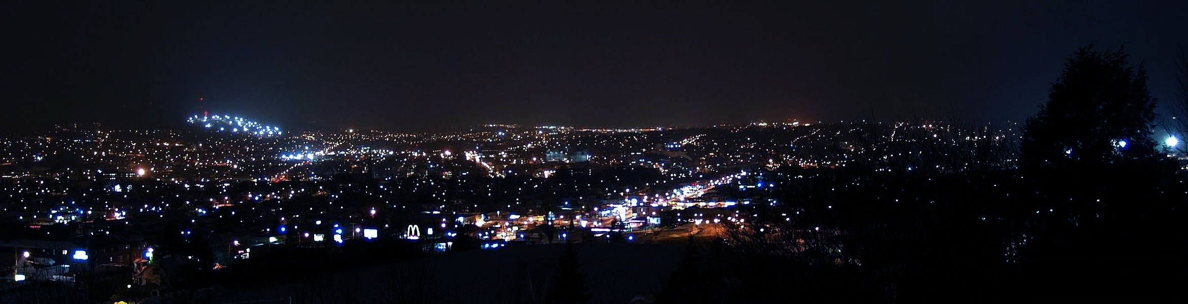 Panorama de Sherbrooke la nuit